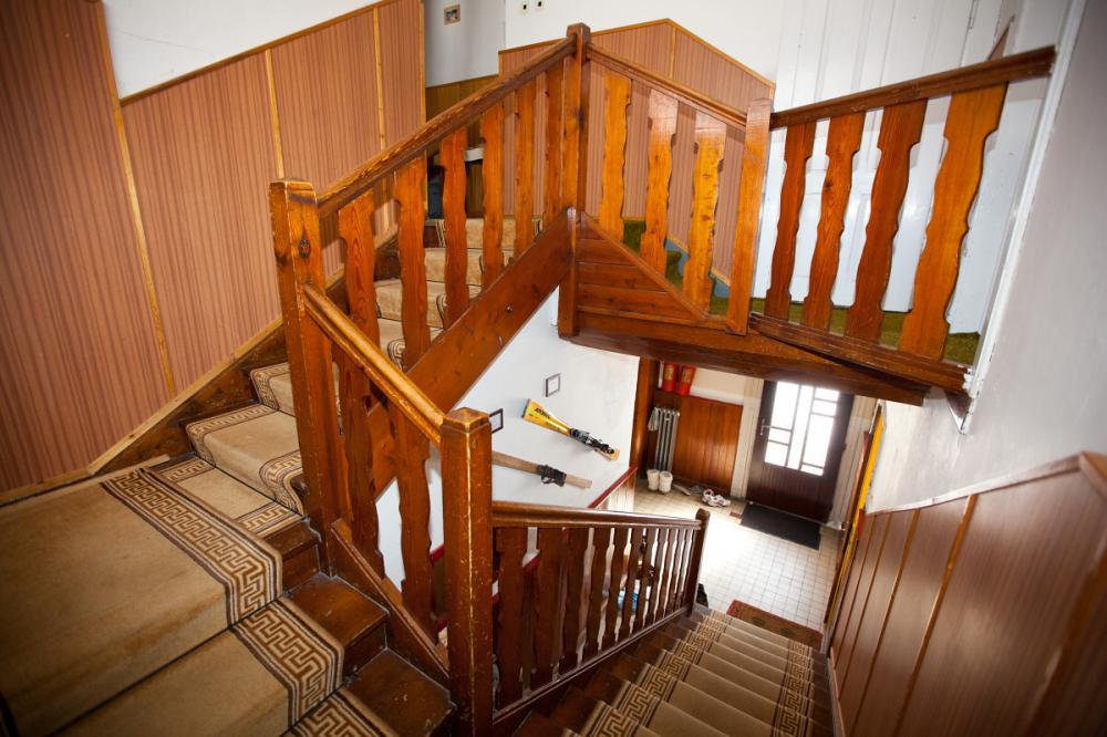 Interiér Rychtrovy boudy na Benecku v Krkonoších - původní modřínové schodiště